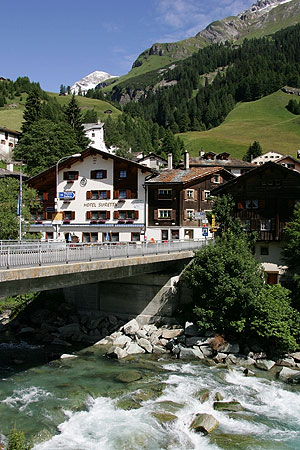 Splügen: Hinterrhein, Hotel "Suretta"